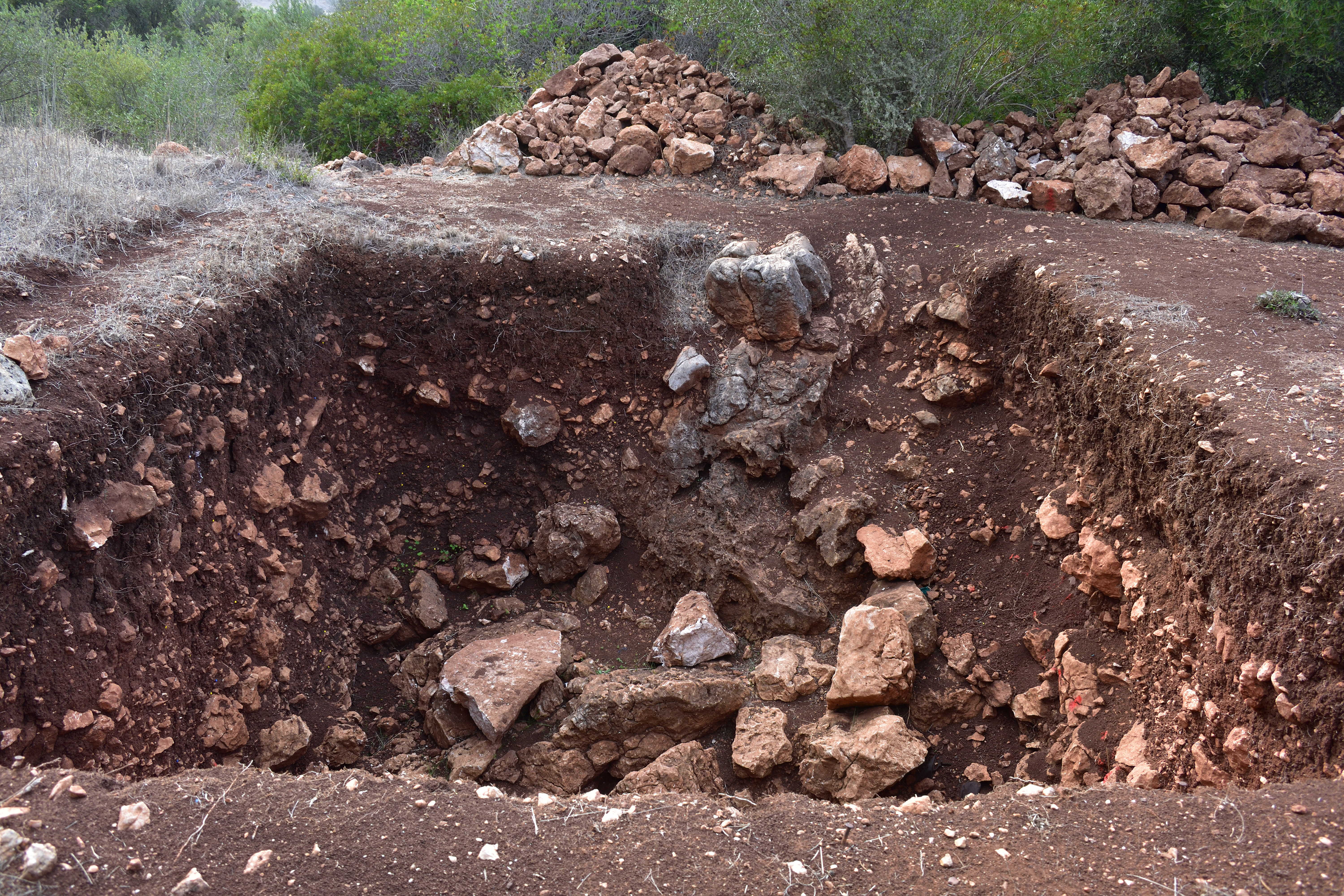 Estação arqueológica de Vale Boi, situada perto da aldeia de Vale de Boi, no concelho de Vila do Bispo, em Portugal.